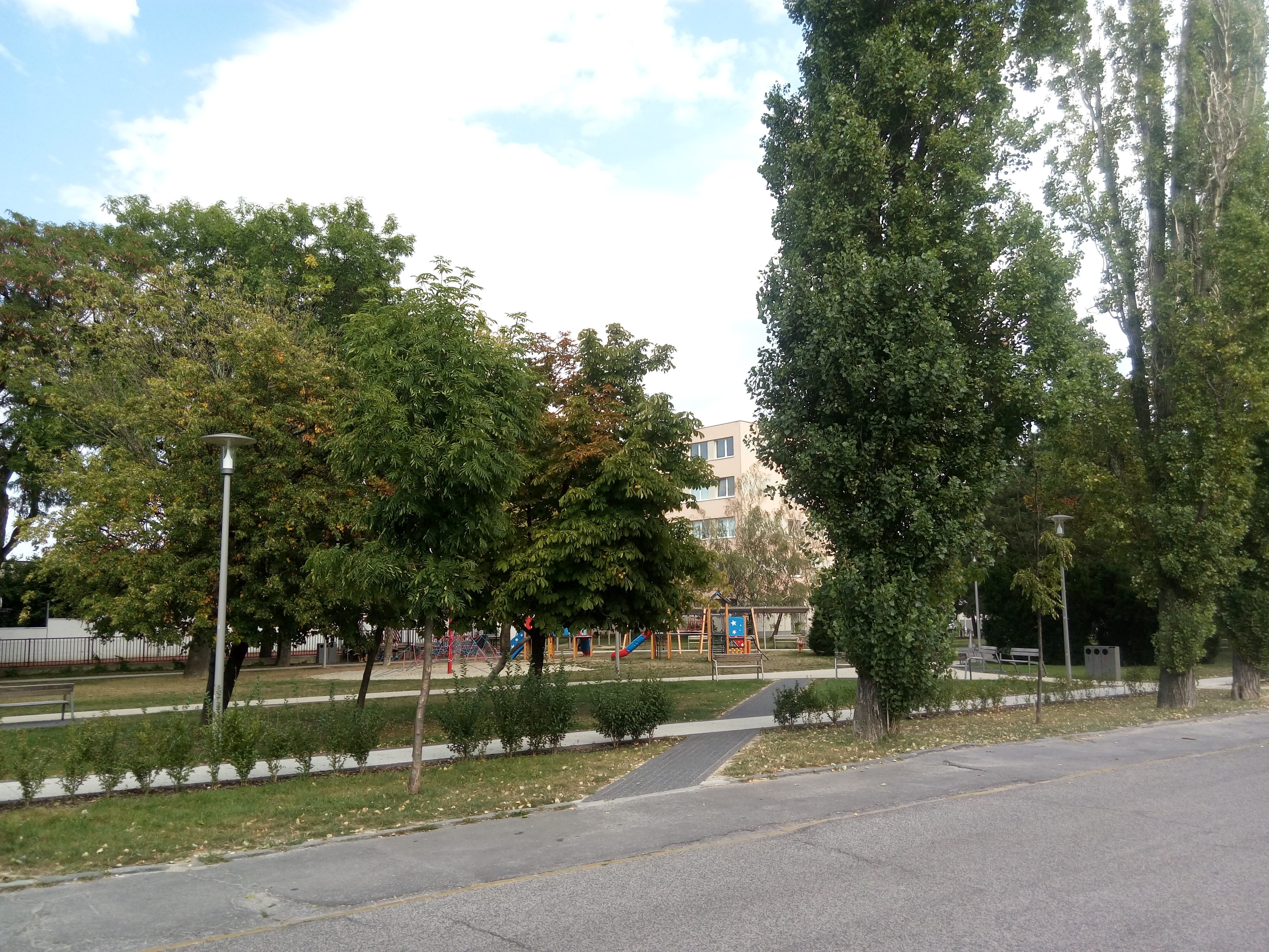 Varšavská, Nové Mesto, Bratislava